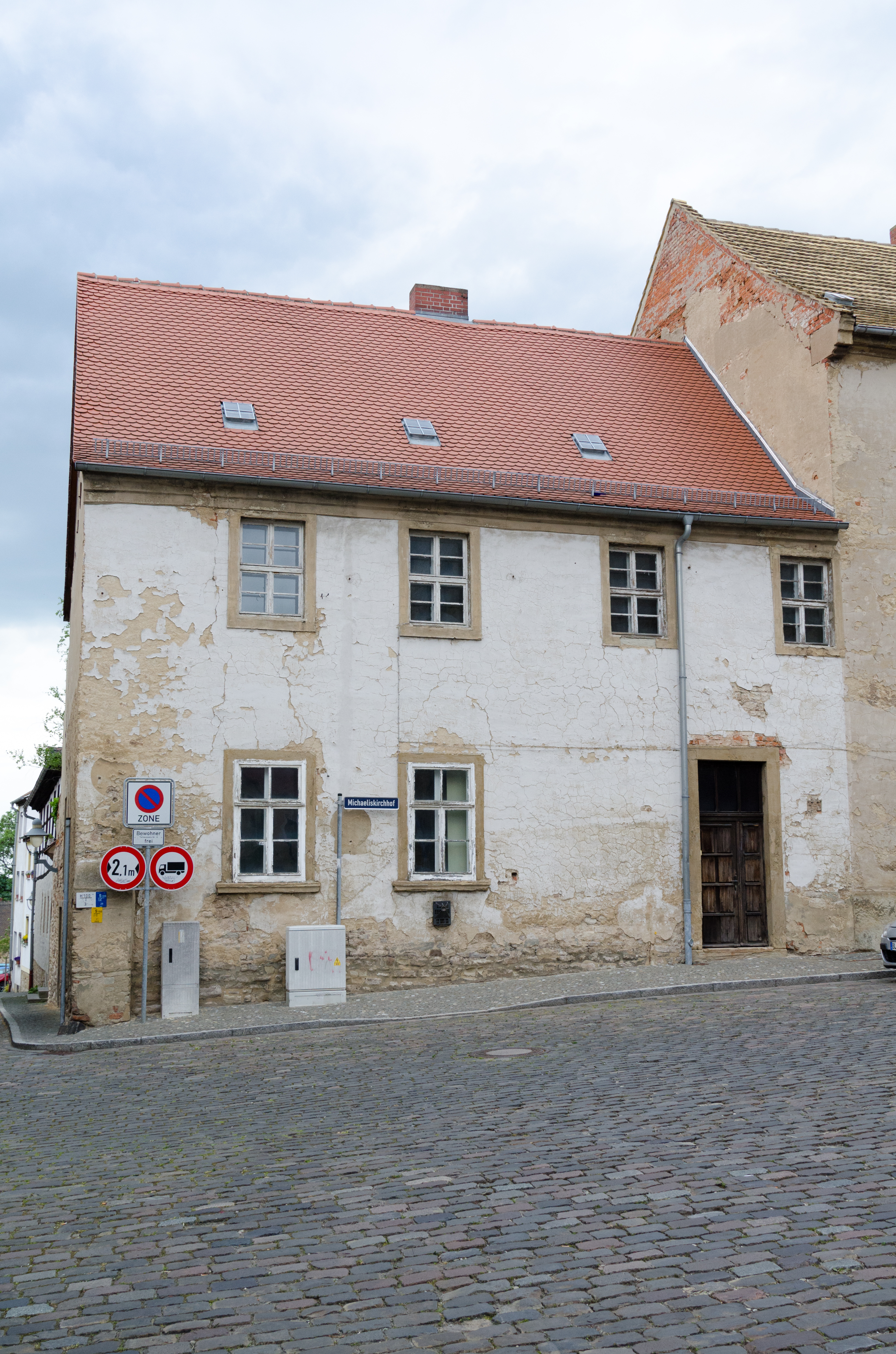 Zeitz, Michaeliskirchhof 10